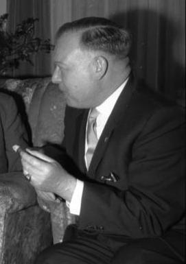 Werner Forßmann bei einer Pressekonferenz des Deutschen Müttergenesungswerks im Haus des Bundespräsidenten